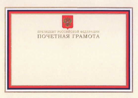 Бланк Почётной грамоты Президента Российской Федерации